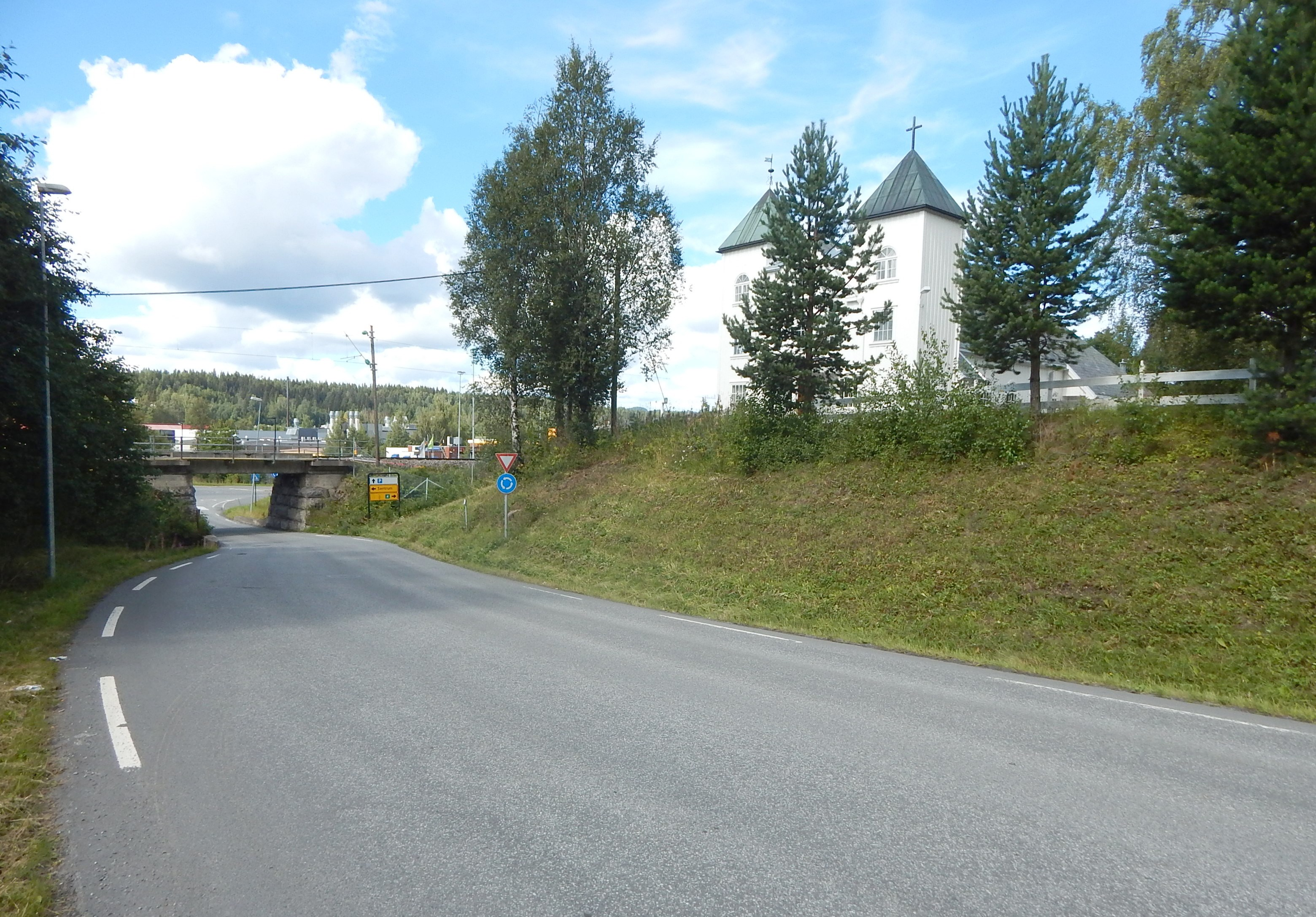 På Raufoss går Øverbyvegen forbi baptistkirken og under Gjøvikbanen til fylkesvei 2368.